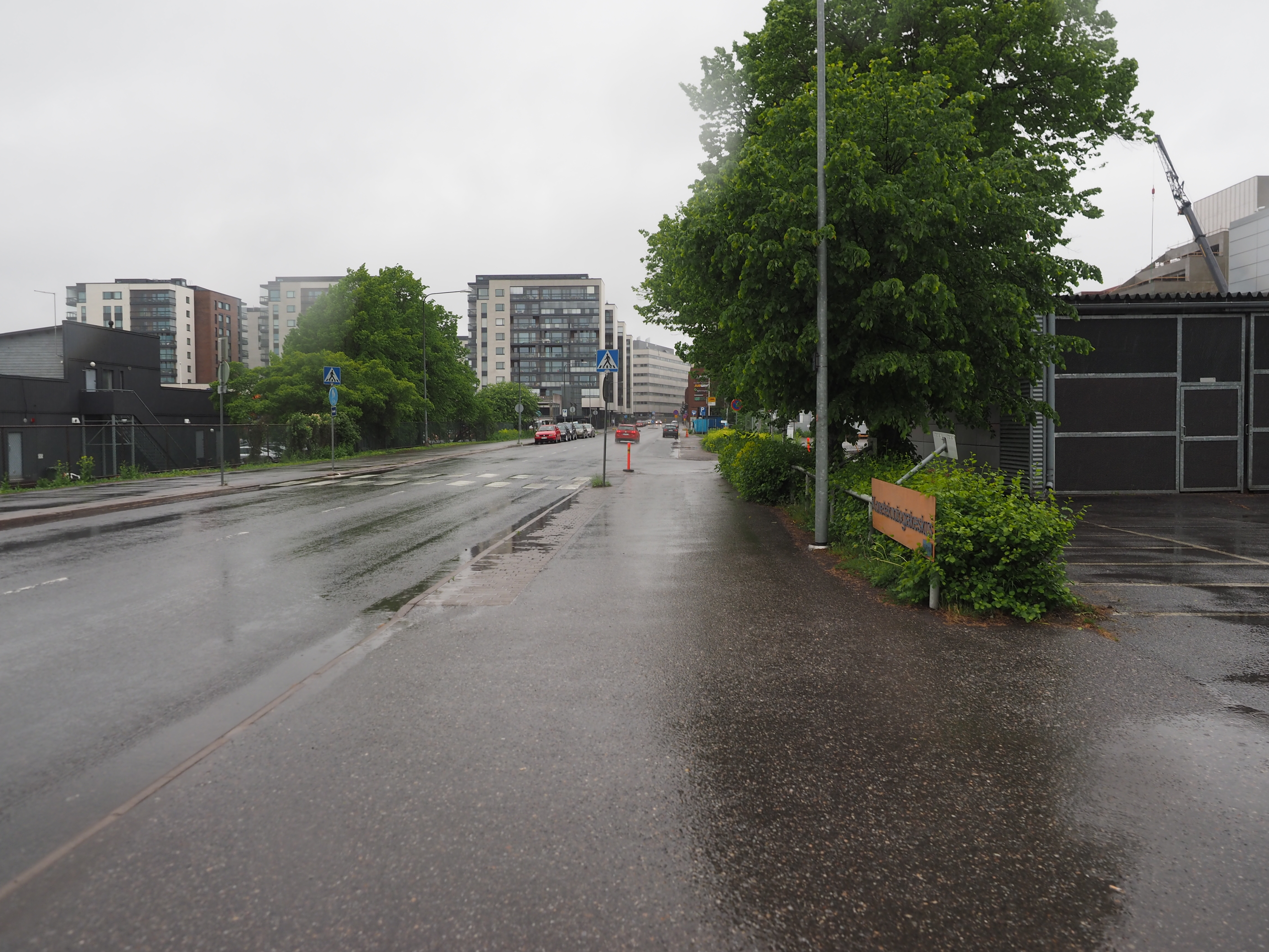 Lemminkäisenkatu in Kupittaa, Turku, Finland, in rainy weather in May.